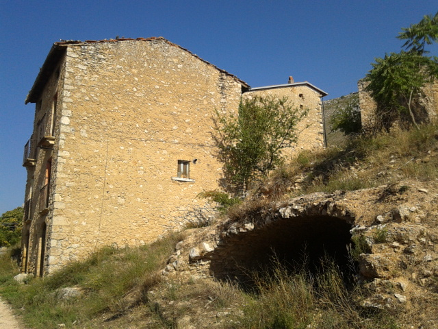 Scorcio fotografico di San Pelino Vecchio